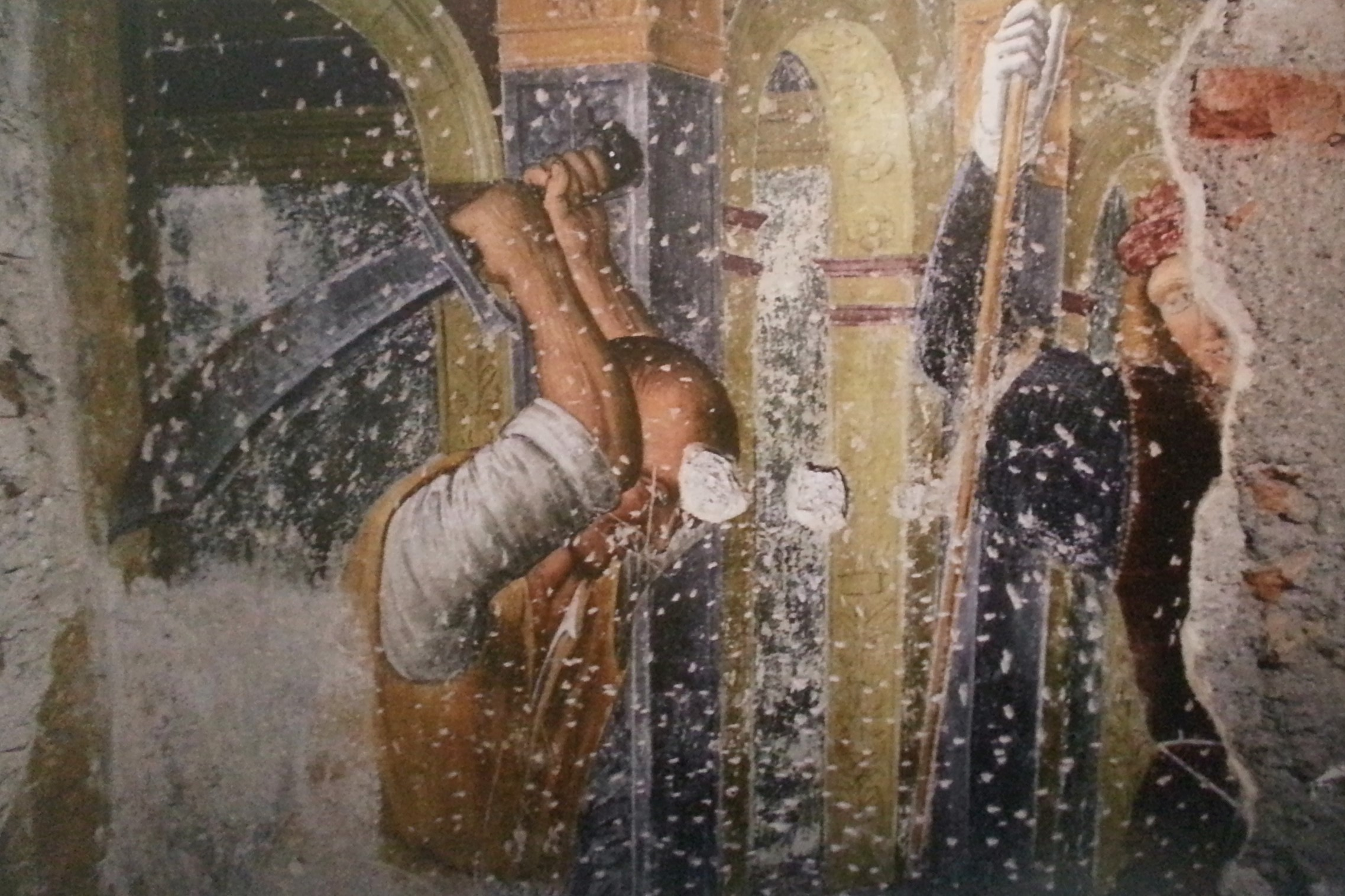 Particolare del martirio di san Cristoforo opera dei Marinoni